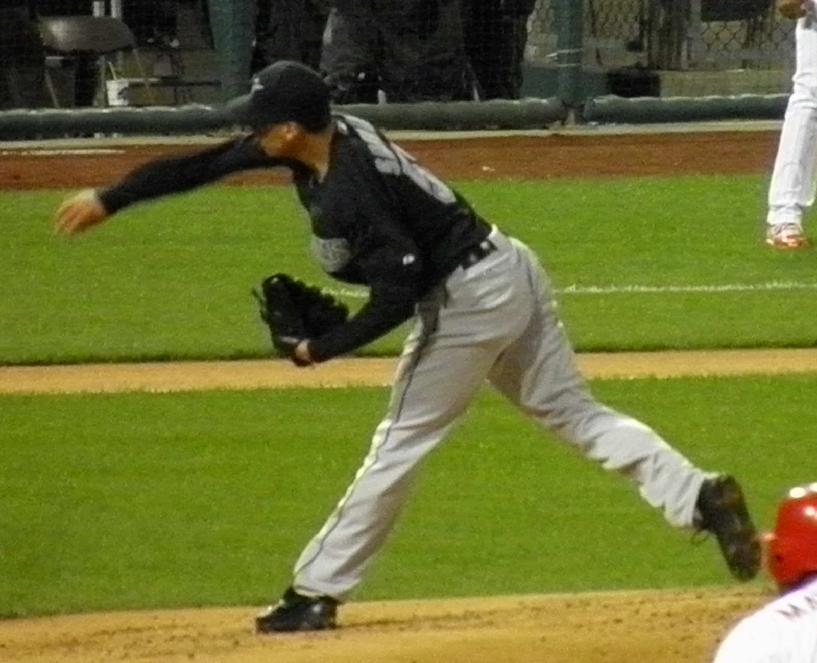 Alex Sanabia